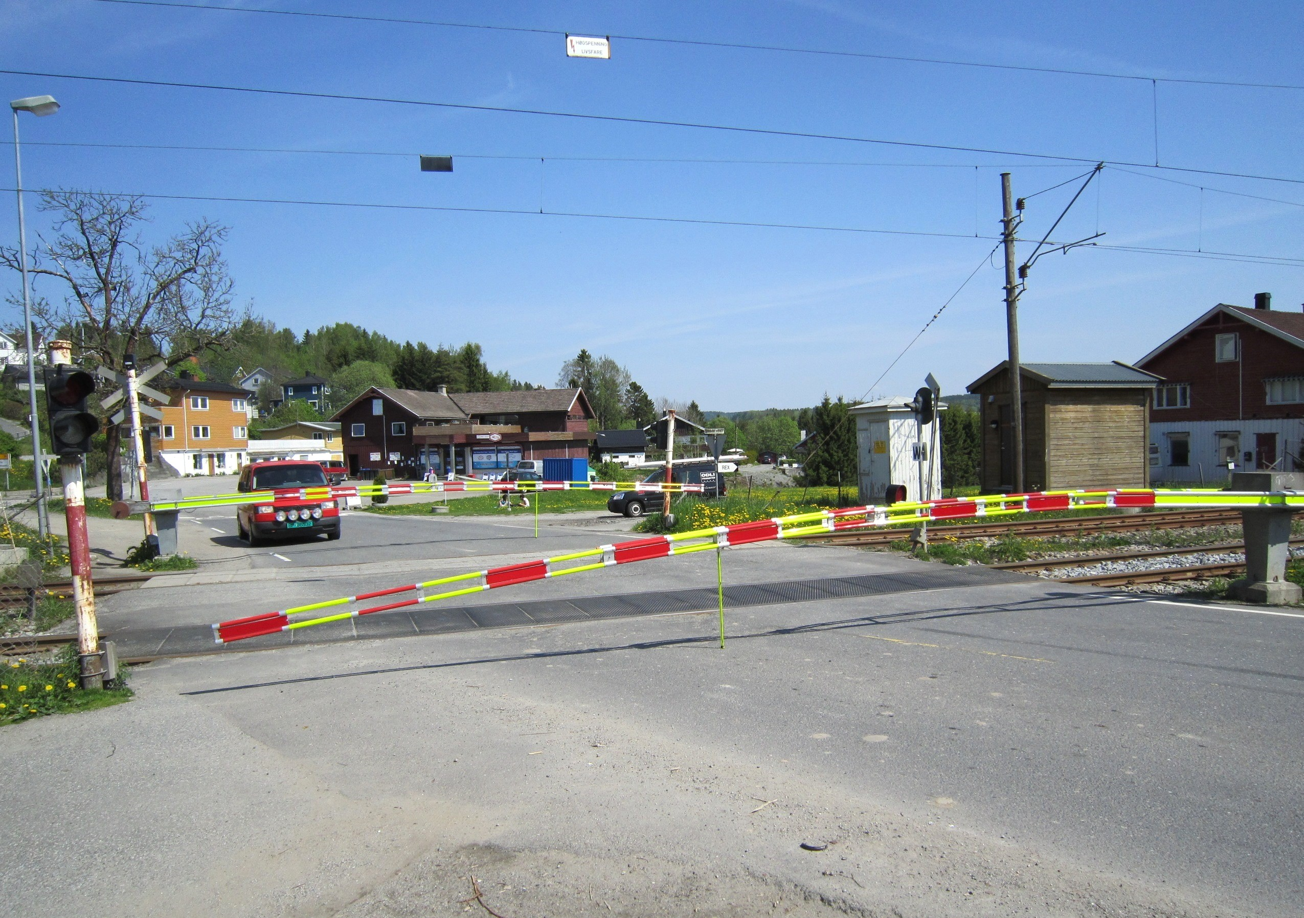 Fylkesvei 120 krysser Østfoldbanen vest for Tomter stasjon.